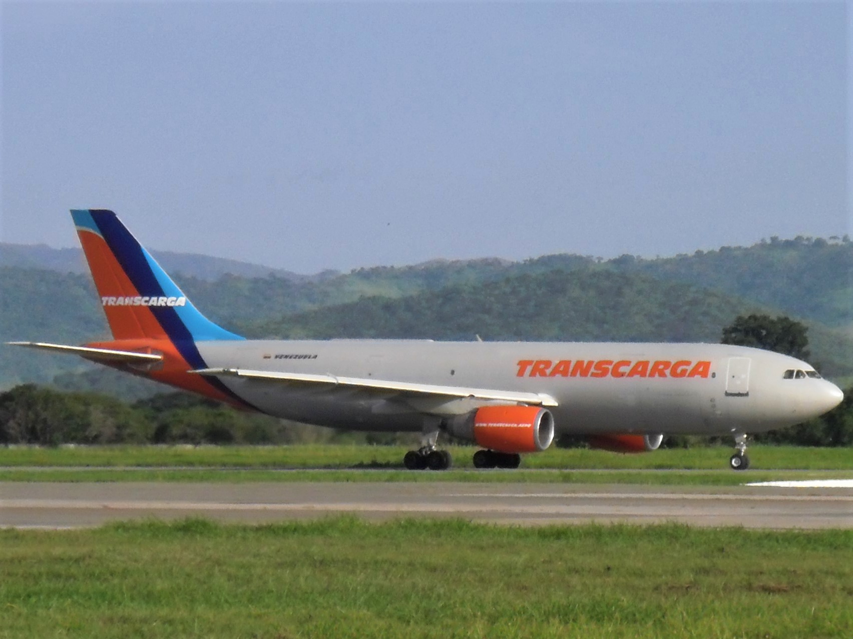 Airbus A300-B4 de la Aerolinea carguera Transcarga VE taxeando a punto bravo SVVA